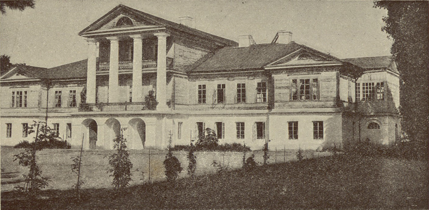 Беларуская (тарашкевіца): Лунін (Łunin), сядзіба Друцкіх-Любецкіх (Drucki-Lubiecki)